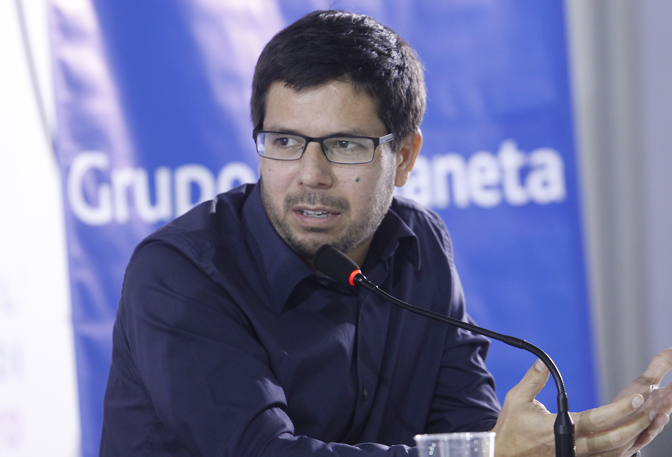 Renato Cisneros en la Feria del Libro Ricardo Palma, 2015. Presentación de La distancia que nos separa.